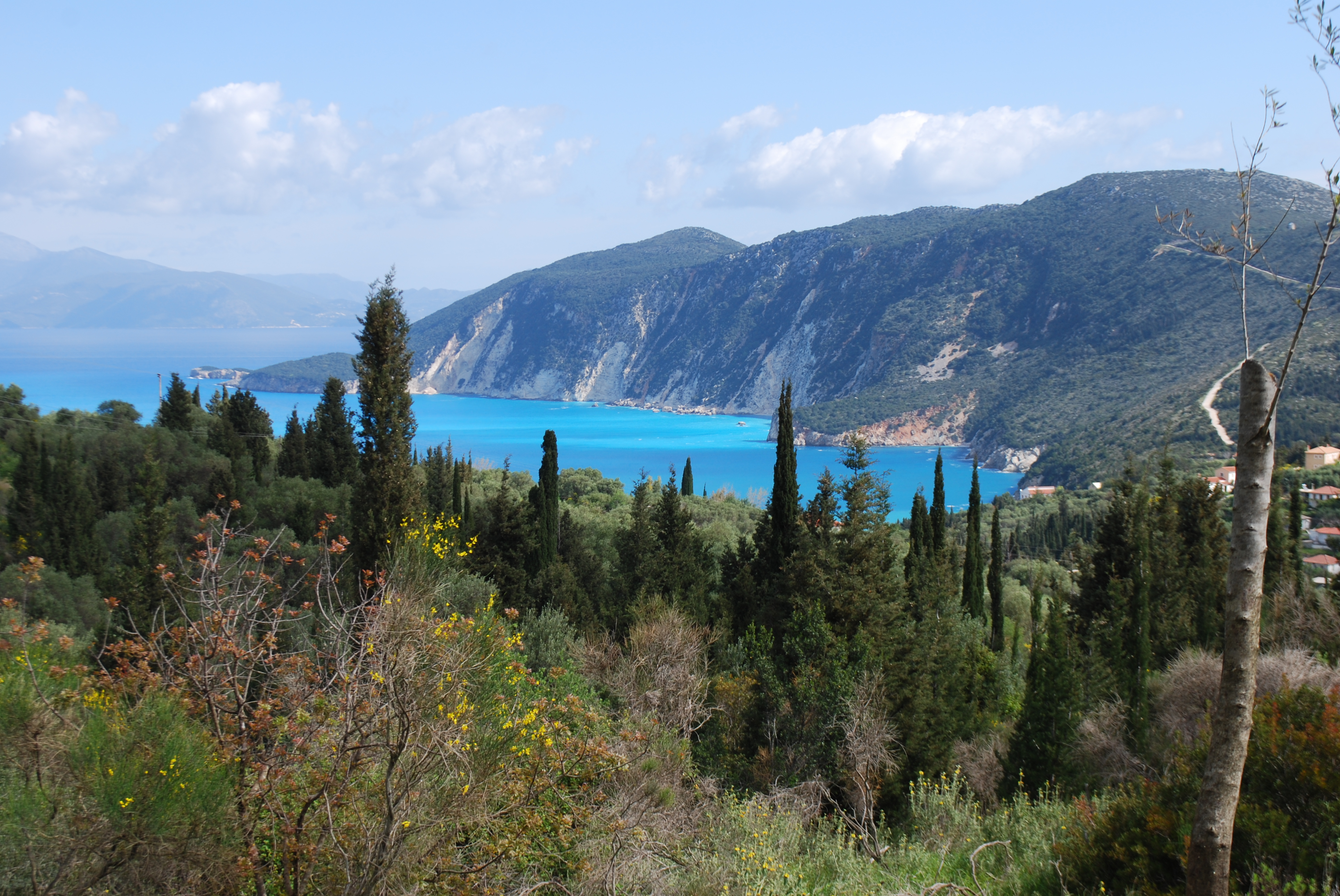 Vue d'Ithaque.